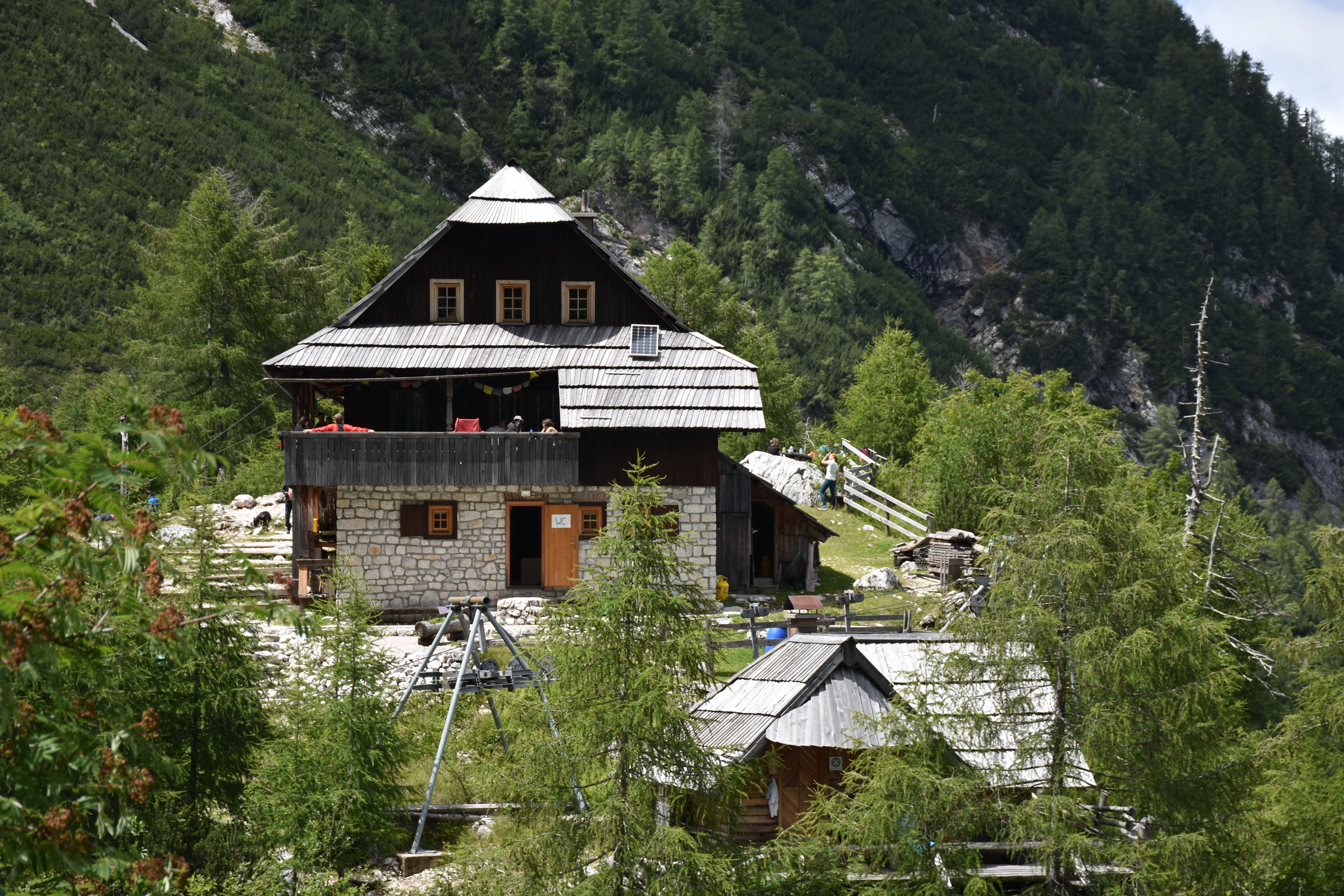 Češka koča